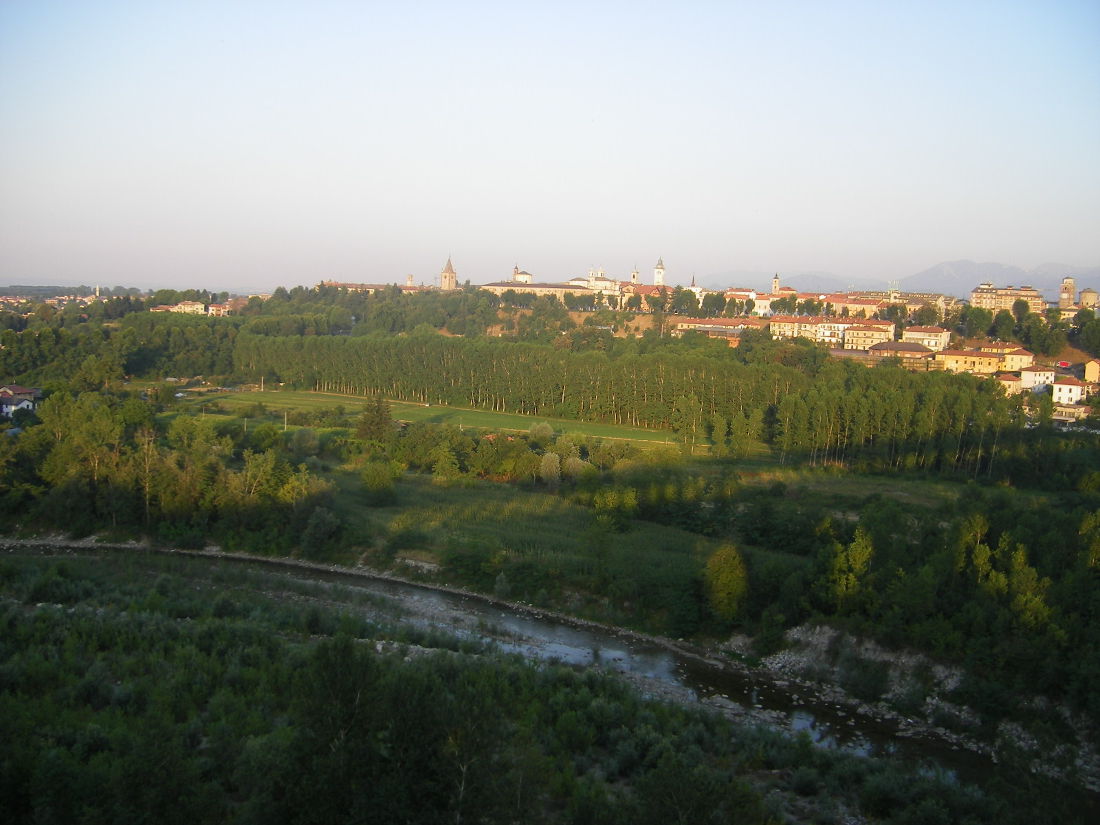 Cuneo